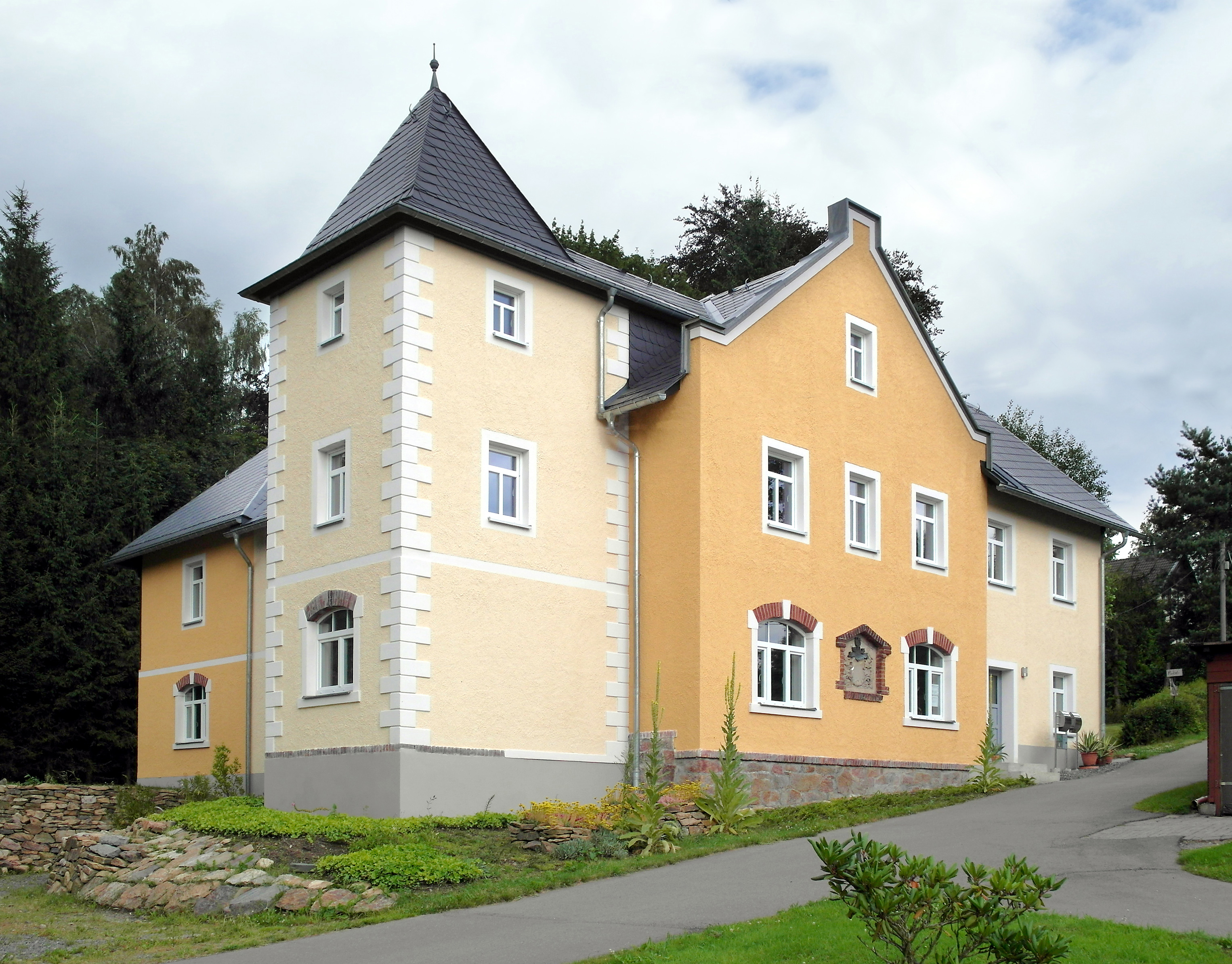 18.07.2016 09618 Mittelsaida (Gemeinde Großhartmannsdorf): Das Herrenhaus des Rittergutes Mittelsaida, Parkstr. 4, wurde Ende 19. Jh. errichtet, vermutlich für CharIes Fedor von Kiel aus Dresden. Für den Bau der Saidenbachtalsperre wurde 1930 die selbständige Bewirtschaftung des Ritterguts aufgegeben. Das Herrenhaus mit Park gelangte in Privatbesitz. Dem desolaten Gebäude drohte noch vor wenigen Jahren der Abriß. Jetzt aber hat es ein neuer Eigentümer schmuck saniert. Nur das Wappenbild in der Kartusche fehlt noch immer. [SAM7160.JPG] 20160718850DR.JPG(c)Blobelt